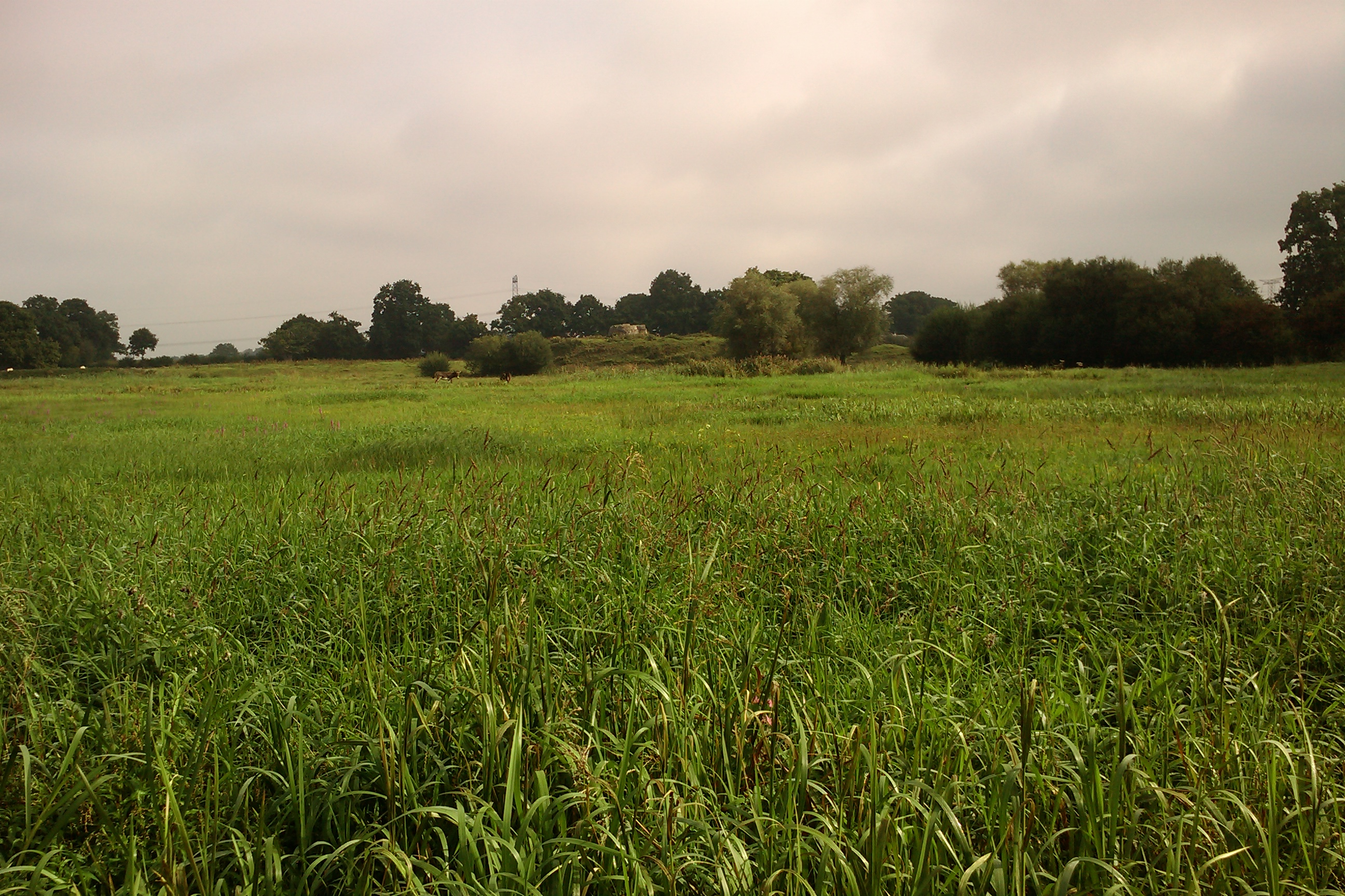 Motte féodale pris depuis les marais (un peu loin mais y avait des bœufs dans le marais...) .